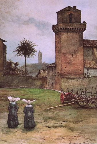 Piazza di San Pietro in Vincoli in Rome (rione Monti)